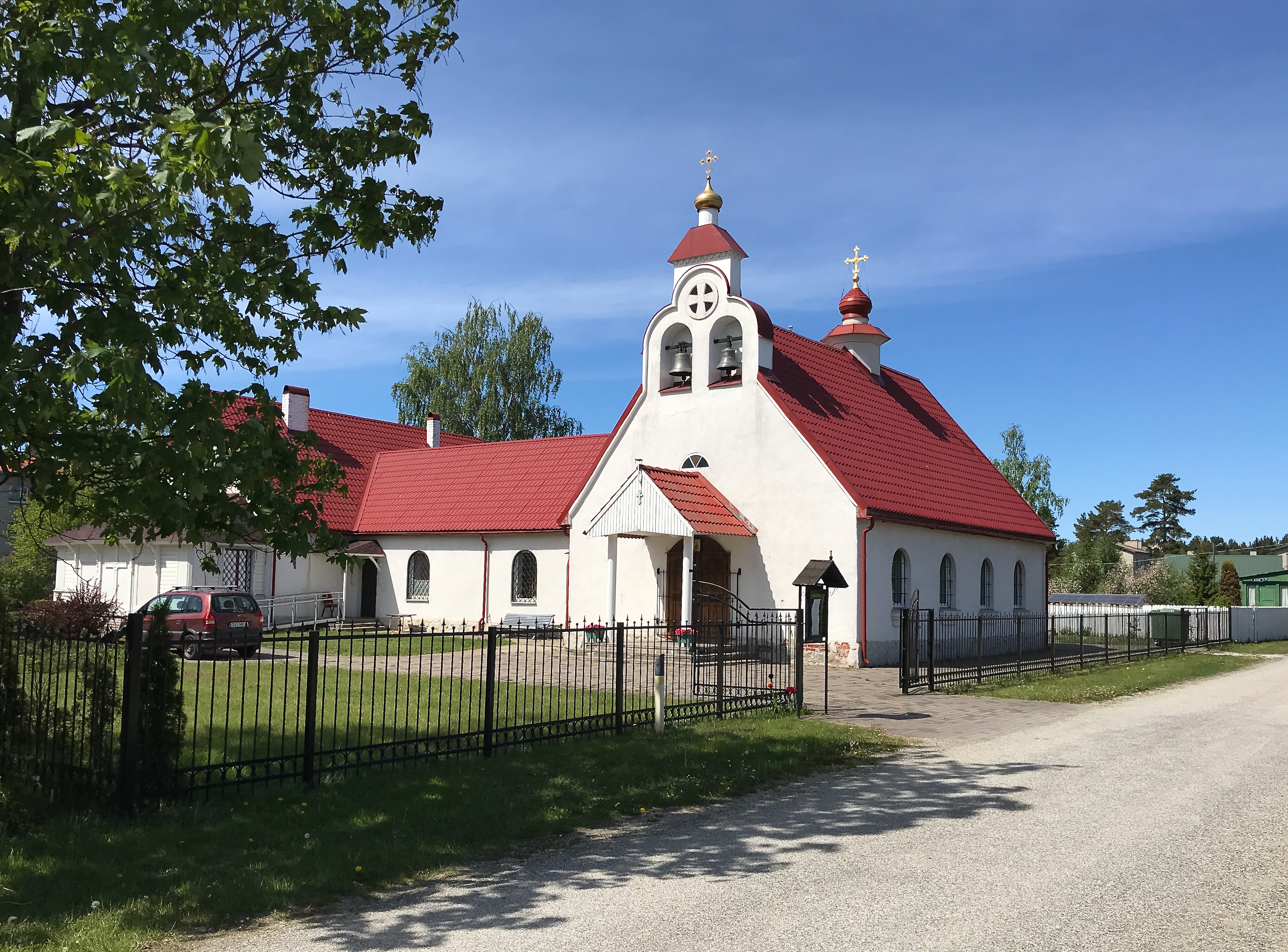 Loksa õigeusu kirik, vaade kagust